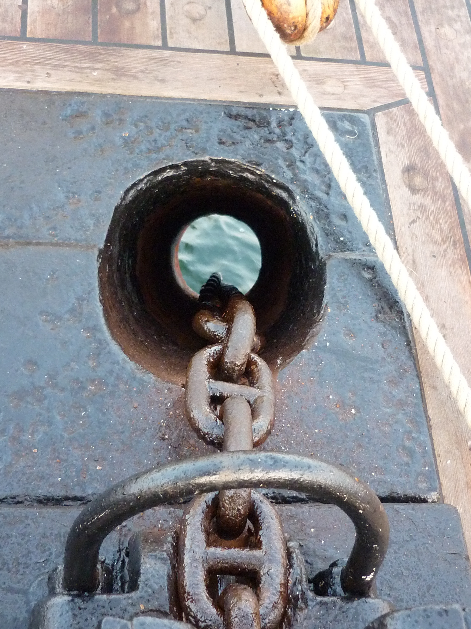 Ankerklüse (SSS Greif, Steuerbord)